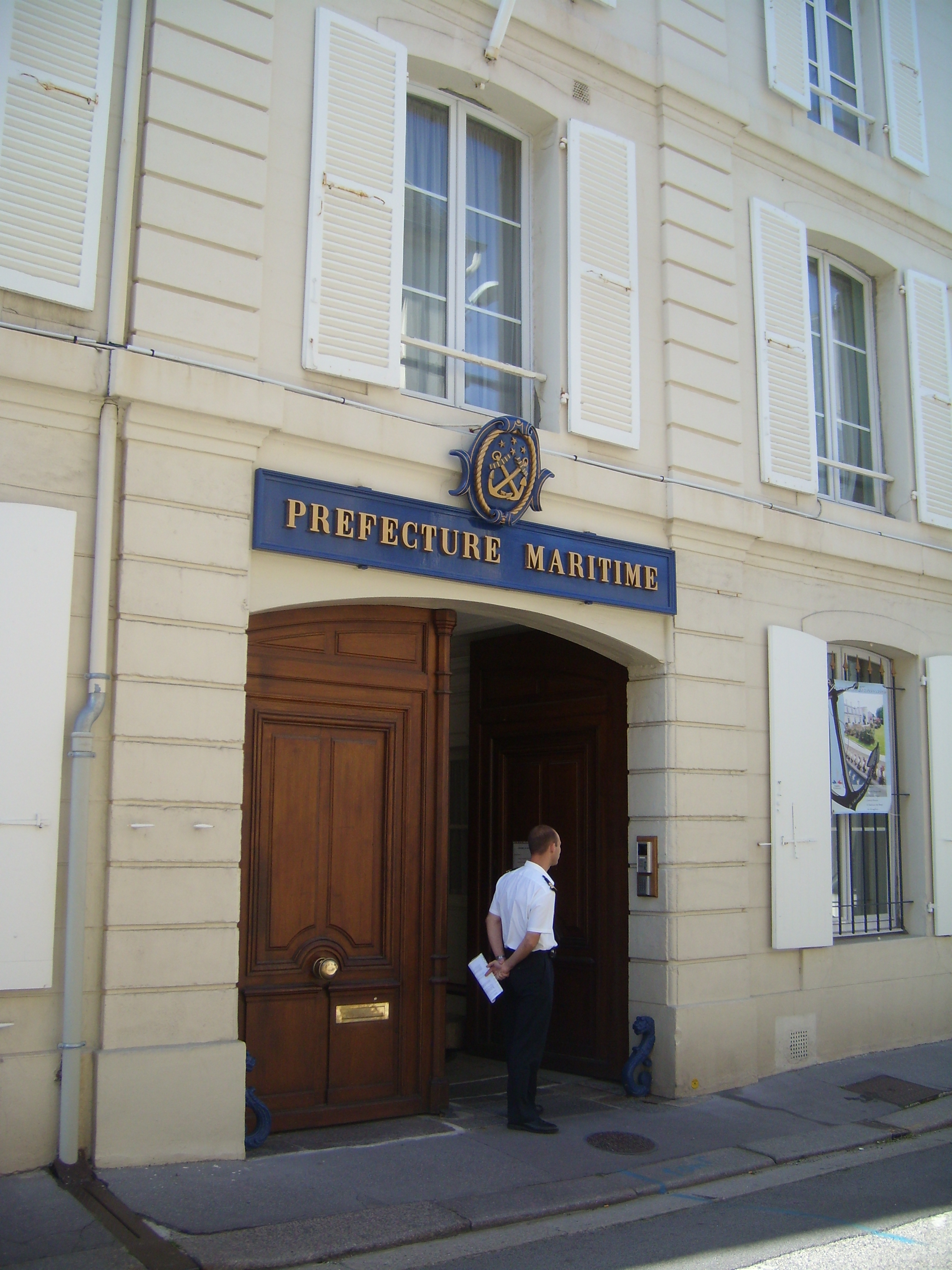 Résidence du Préfet maritime de Cherbourg, rue des Bastions, Cherbourg-Octeville